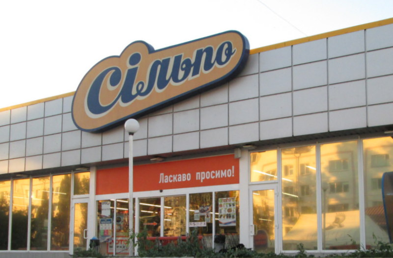 Магазин Сільпо на проспекті Жовтневої Революції в Севастополі